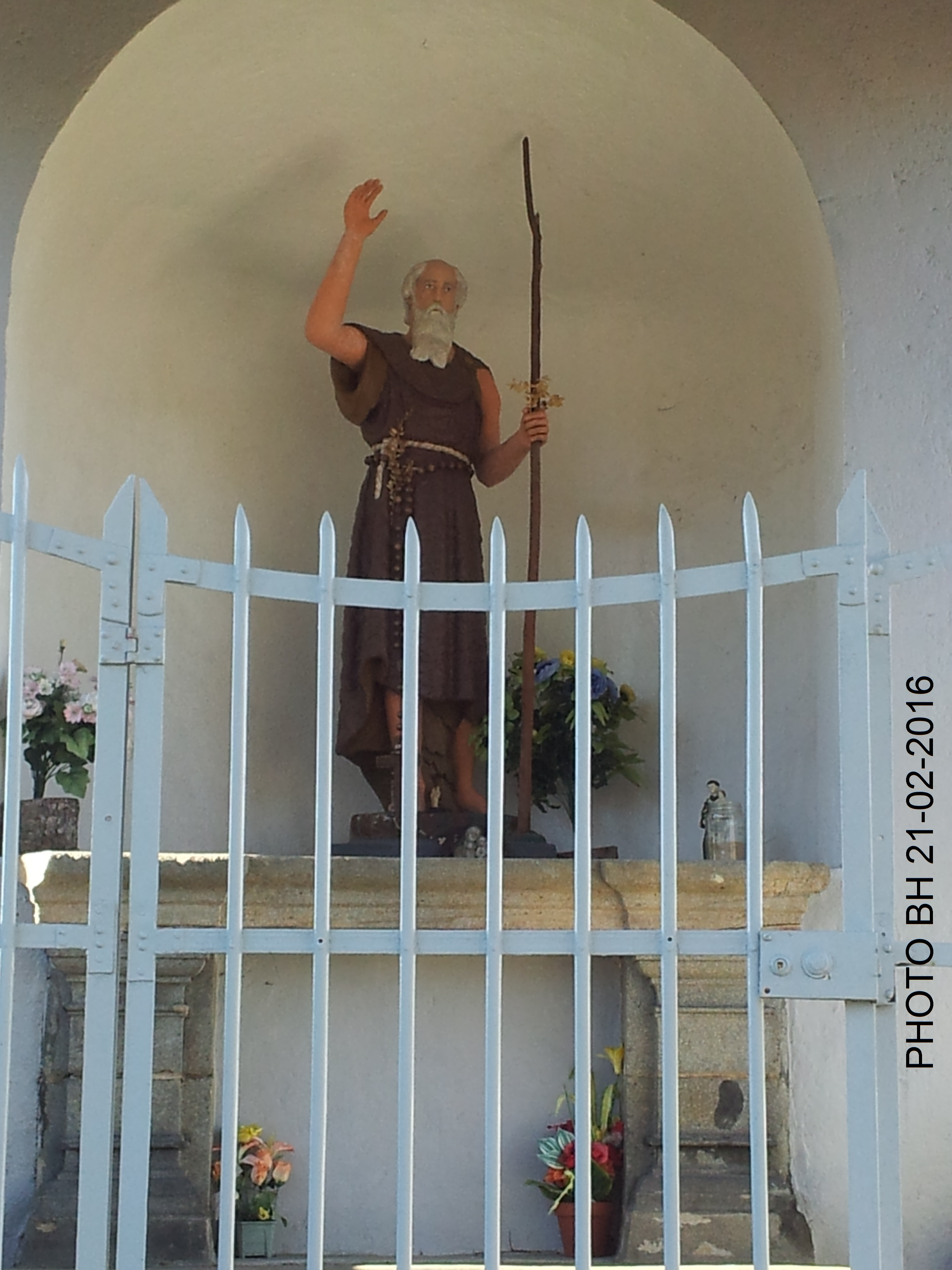 Marien de Combraille : statue du saint, chapelle Saint-Marien, 23110 Évaux-les Bains